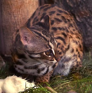 Prionailurus bengalensis in a zoo (Tierpark) - Berlin